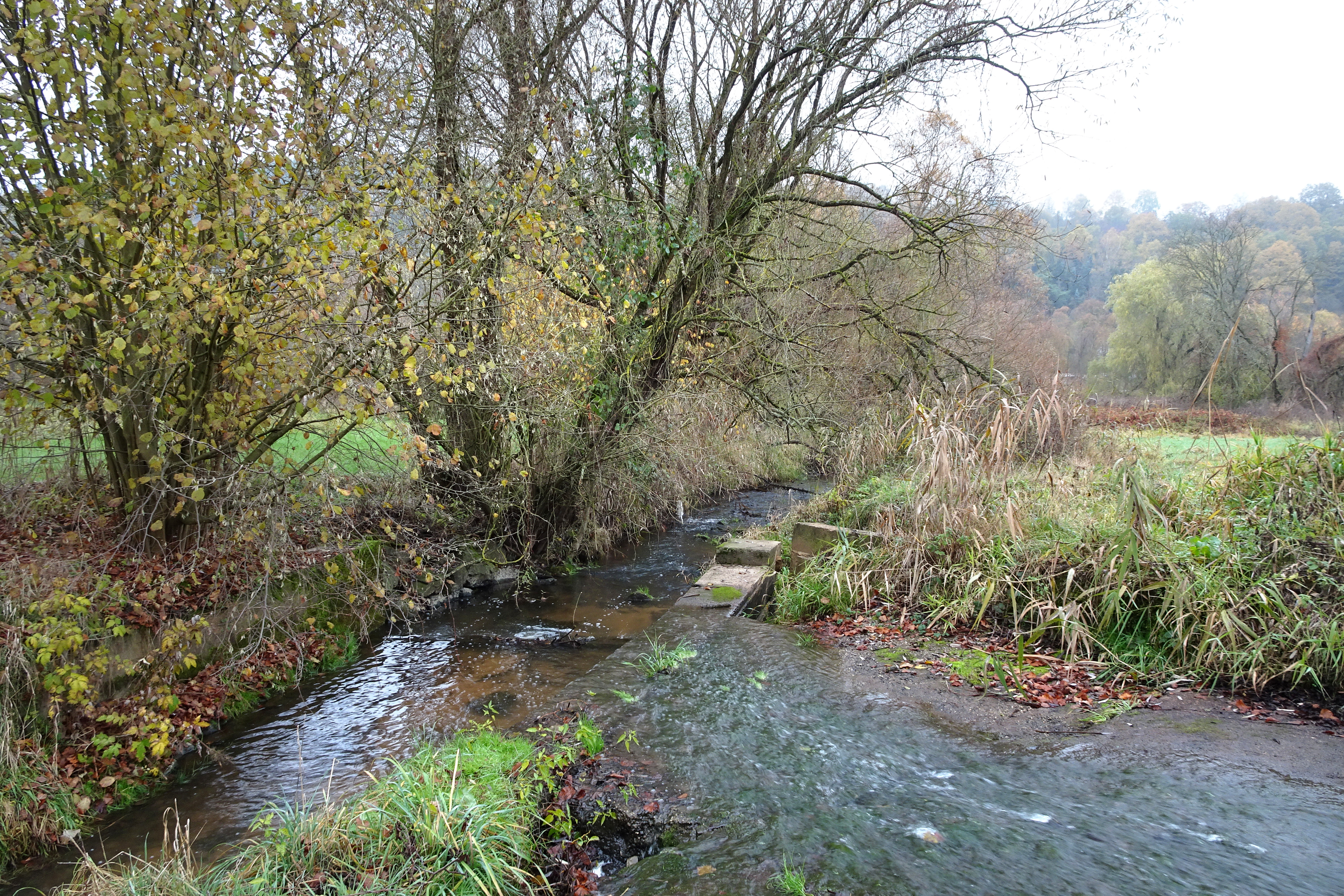 Die „Ulfewiesen bei Weiterode“ sind ein feuchtes Auengebiet im hessischen Landkreis Hersfeld-Rotenburg, zwischen dem Bebraer Stadtteil Weiterode und der Gemeinde Ronshausen. Durch den Wiesengrund fließt die namengebende Ulfe, die nahe der Landesgrenze zu Thüringen aus dem Zusammenfluss zweier Quellbäche entsteht. Der ehemals begradigte Bach wurde in Zusammenarbeit von ehren- und hauptamtlichem Naturschutz in den letzten Jahrzehnten naturnah umgestaltet. Die Renaturierungsarbeiten hatten zum Ziel, durch die Verlegung des Baches neue auentypische Lebensräume vorzubereiten. Die Ulfe mündet, wenige Kilometer von den Ulfewiesen entfernt, als rechter Zufluss in die Fulda. Um die Eigenentwicklung des Bachlaufs der Ulfe mit ihren Zuflüssen zu fördern und die angrenzenden Auenbereiche als Lebensraum der hier vorkommenden seltenen Pflanzen- und Tierarten zu sichern, wurden die Ulfewiesen im Dezember 1995 zum Naturschutzgebiet erklärt.